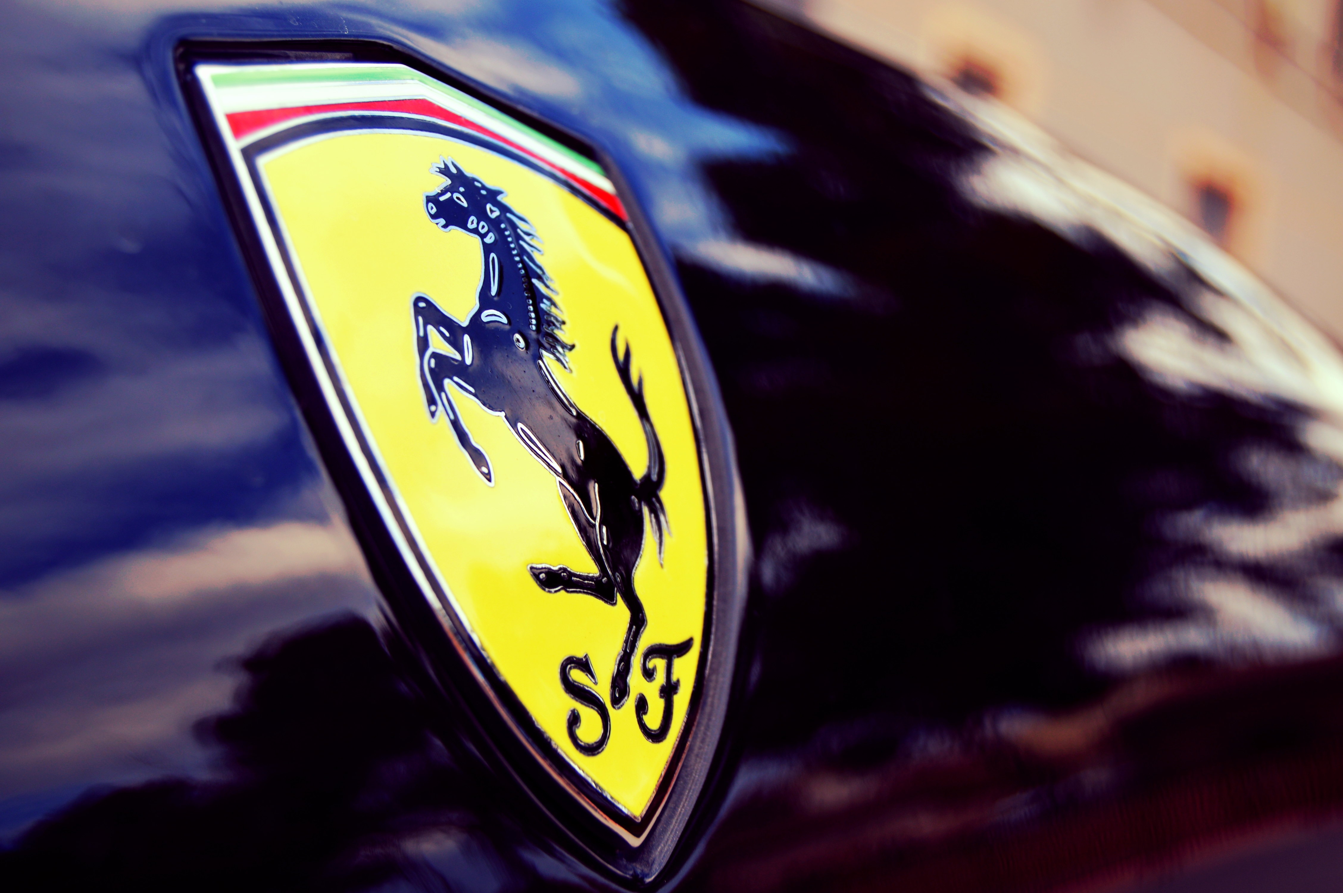 Ferrari California. Ferrari California logo. very cool.